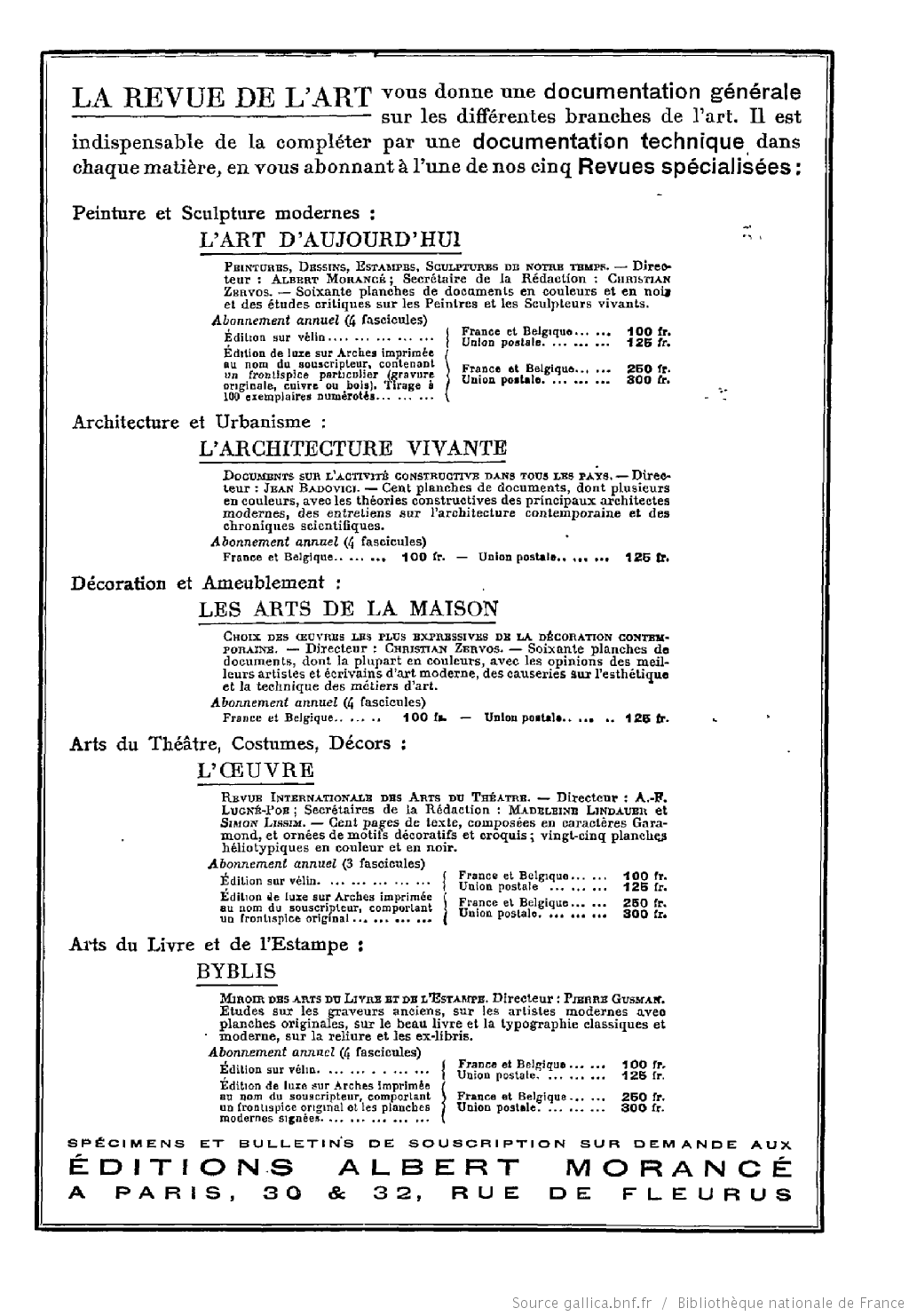 Publicité pour les publications en revues des éditions Albert Morancé parue en 1925 dans La Revue de l'art ancien et moderne, vol. 1925, page 573.